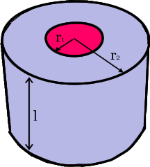 Silindirsel elektrot